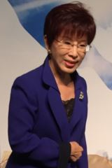 立法院副院長洪秀柱穿著藍色上衣